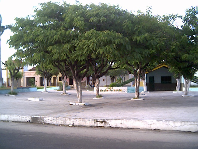 Praça do Barrocão, Crateús, Ceará, Brasil, 2005.